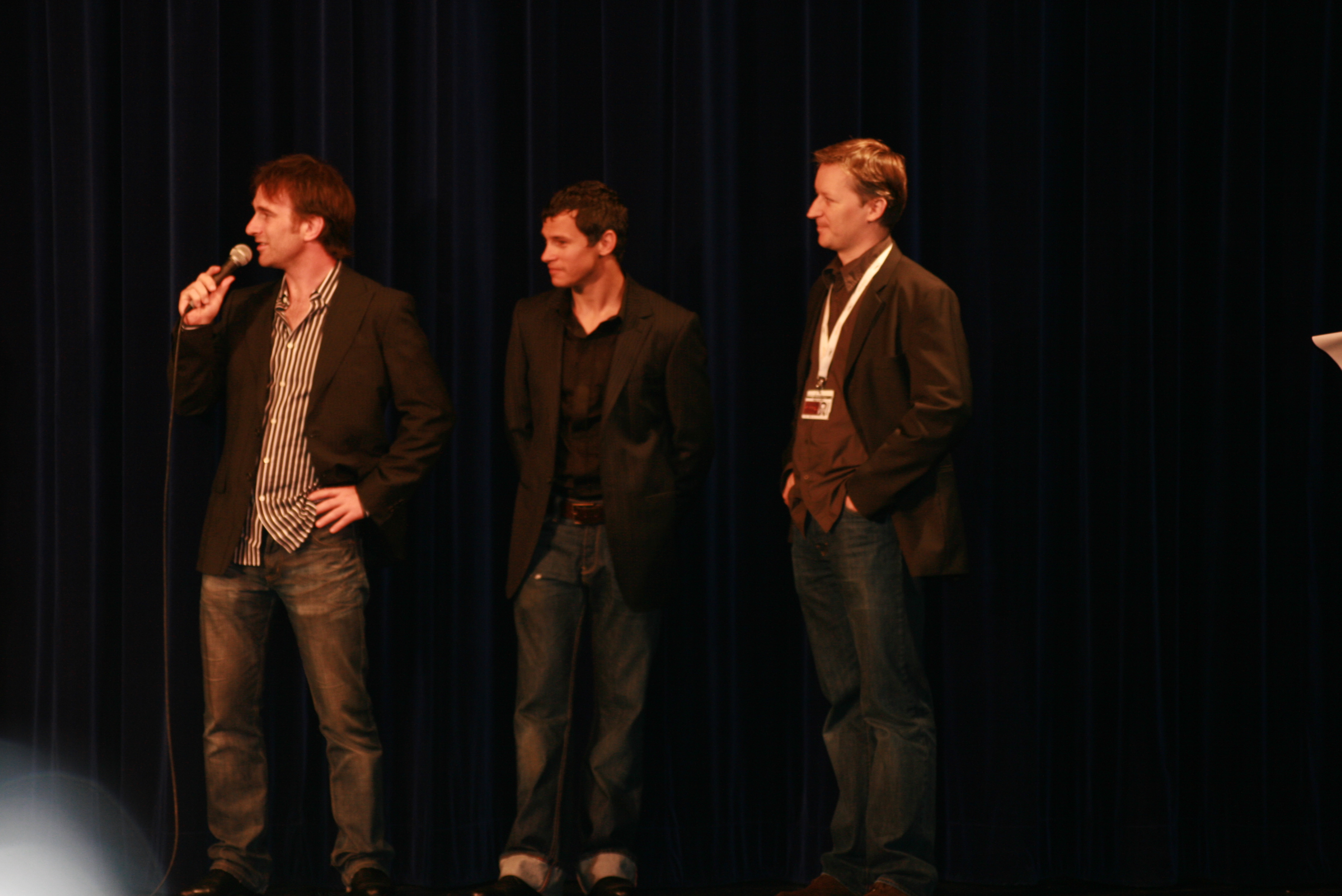 L'équipe de Nos retrouvailles (film français de David Oelhoffen, 2007) lors de la 46è Semaine de la Critique à Cannes pour la première mondiale de son long métrage.